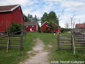 Viser Bygdetunet ved inngangen.